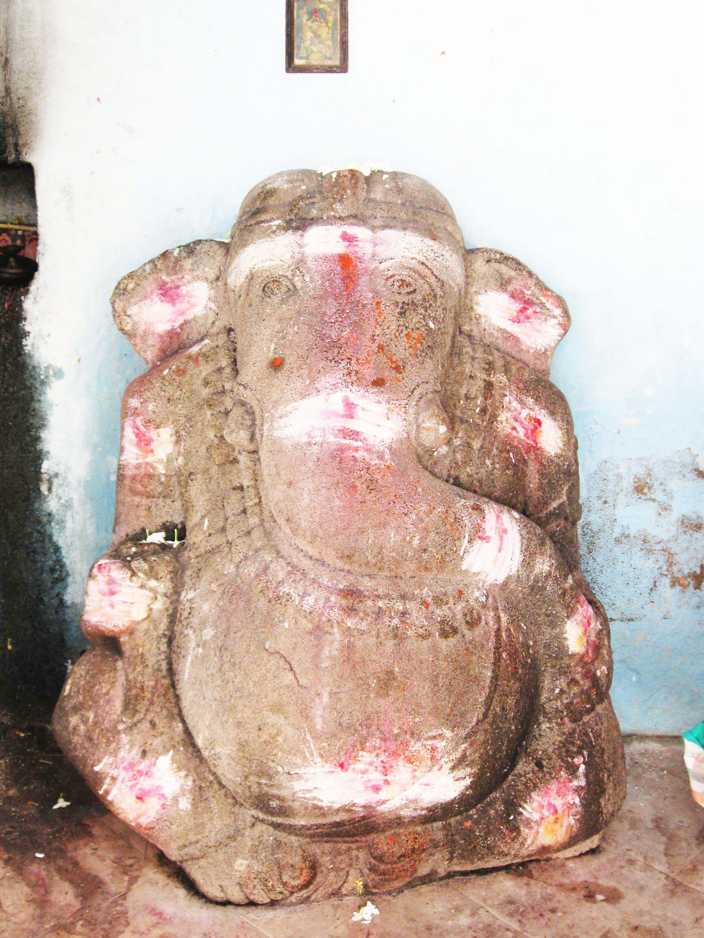 రెండుచేతుల ఇసుకరాయి గణపతిశిల్పం